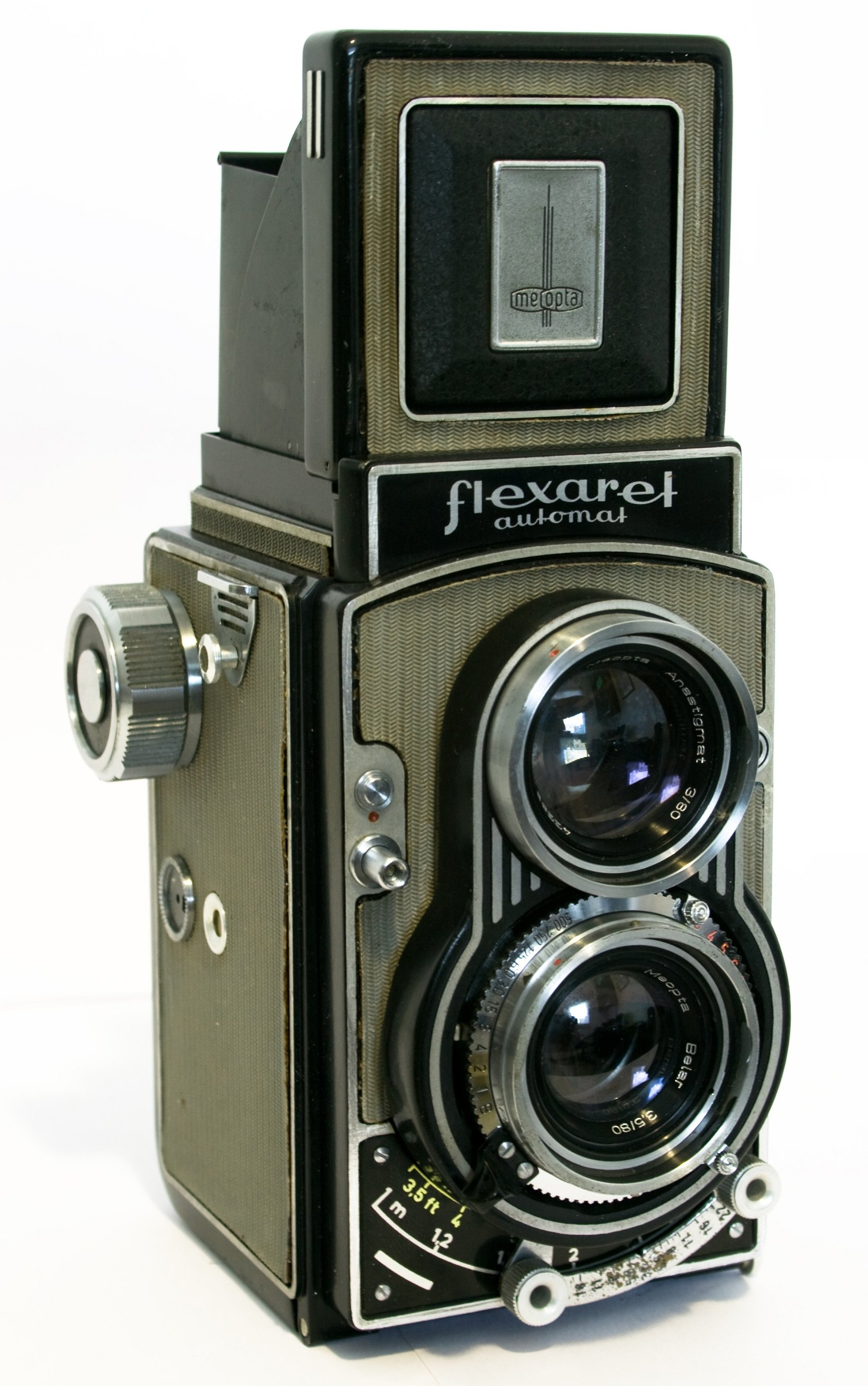 Custei a entender o funcionamento, totalmente diferente de todas as TLRs que conheço. Tchecazinha nada óbvia.